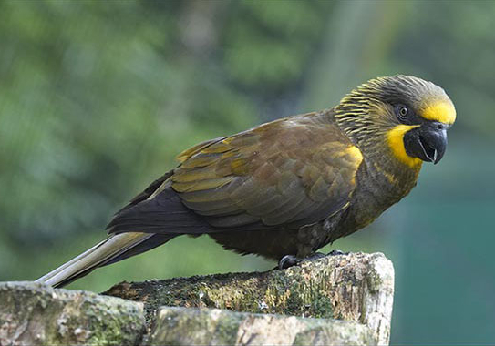 lori de duyvenbode Chalcopsitta duivenbodei